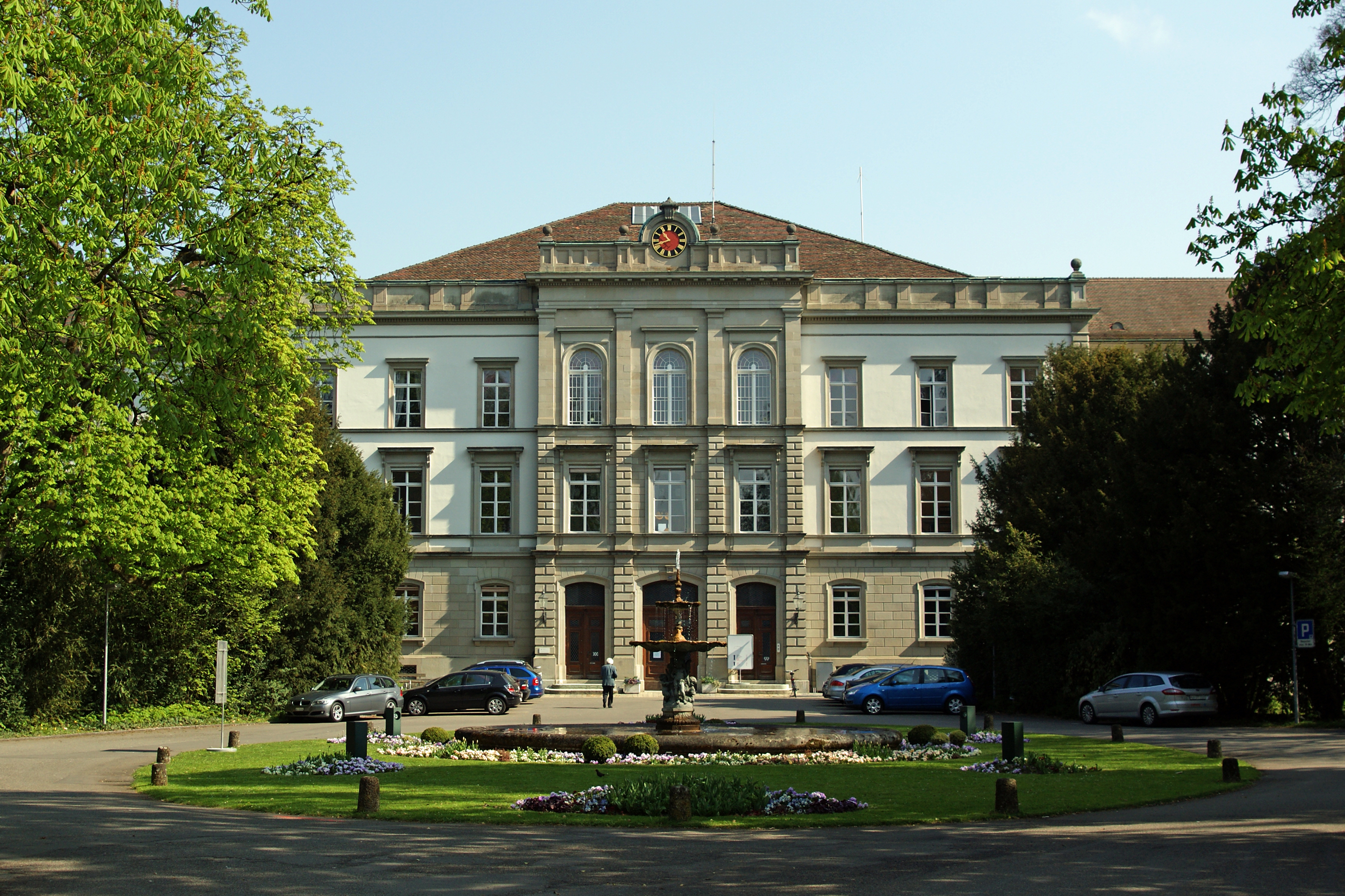 Hauptgebäude der Psychiatrischen Klinik Koenigsfelden in Windisch bei Brugg Kt. Aargau